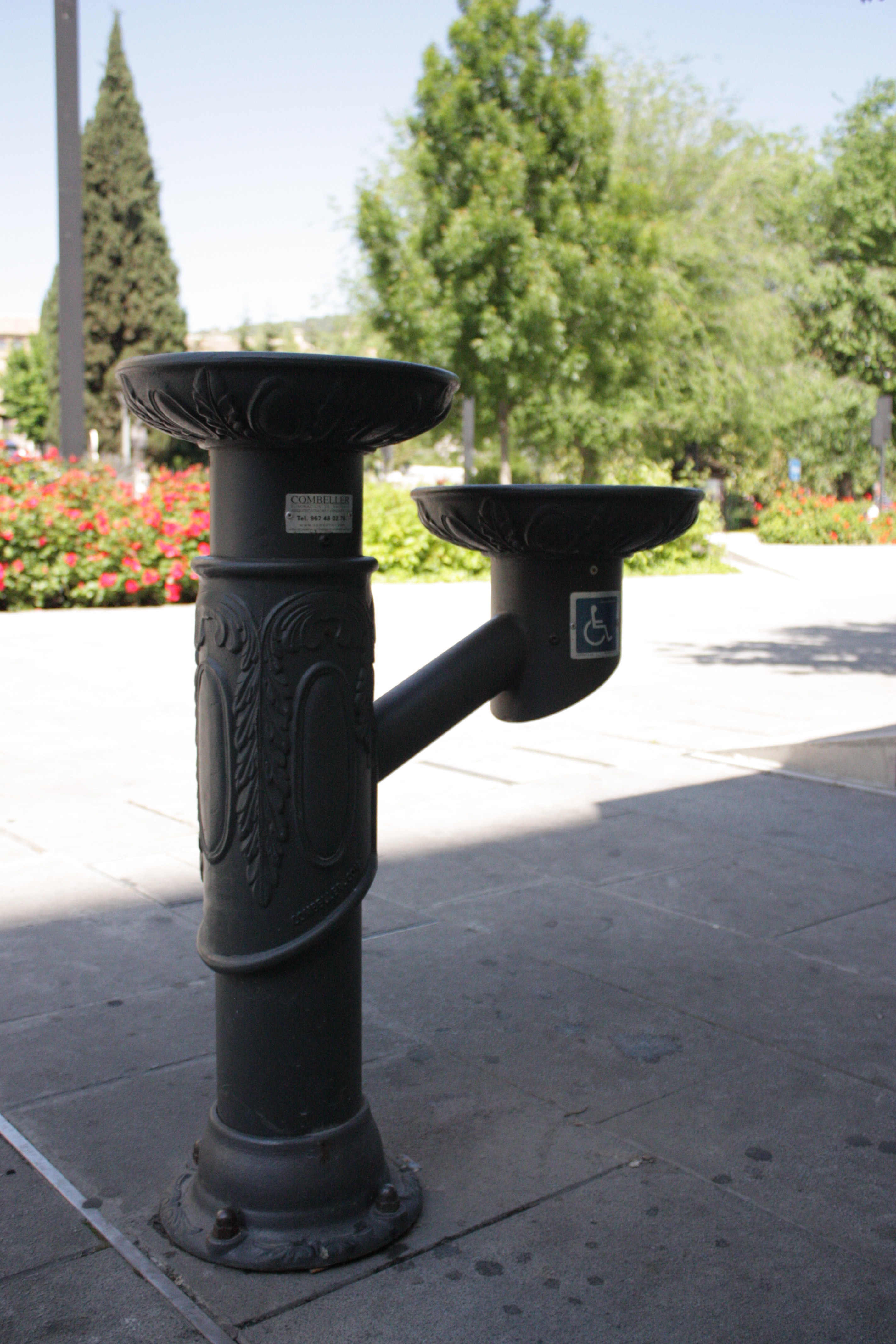 Fuente con adaptación para la accesibilidad de discapacitados, en la Avenida de la Constitución de la ciudad de Granada (España).